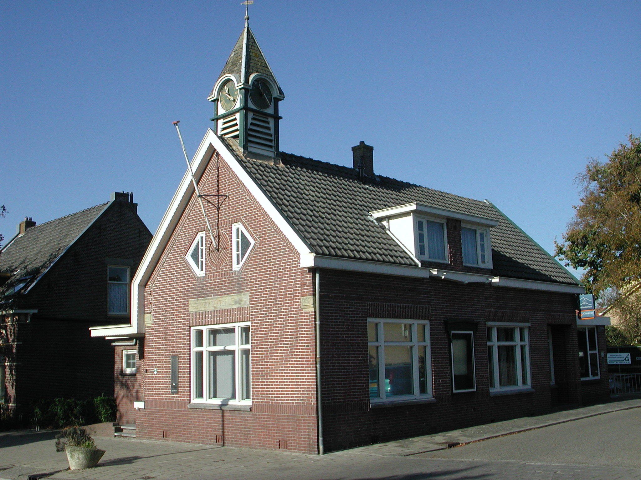 Gemeentehuis Lange Ruige Weide, Driebruggen Categorie:Wikipedia:Afbeeldingen/Gebruiker:P.H. Louw